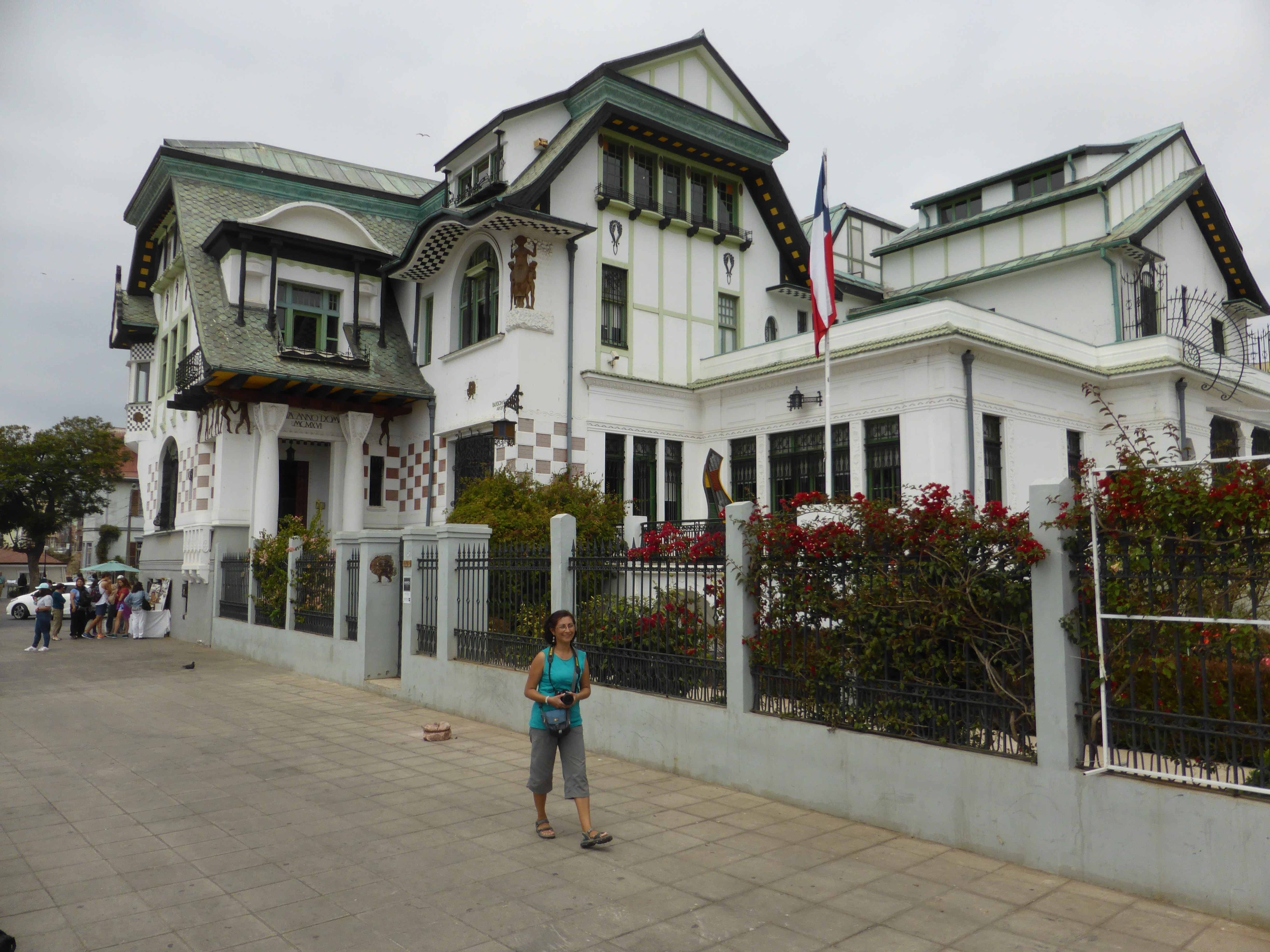 El Museo Municipal de Bellas Artes de Valparaíso se encuentra en este inmueble, llamado Palacio Baburizza, en el paseo Yugoslavo del cerro Alegre.